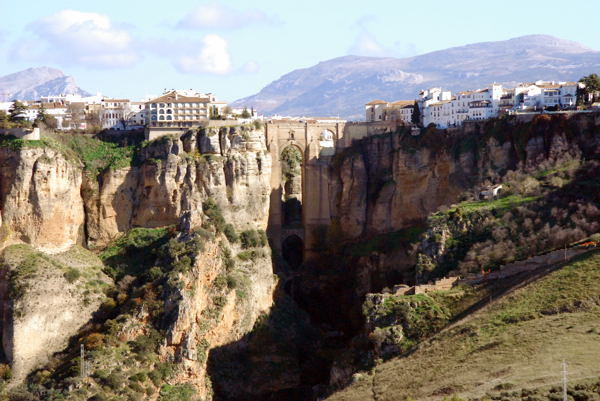 Tajo de Ronda (Puente Nuevo desde la Virgen de la Cabeza)